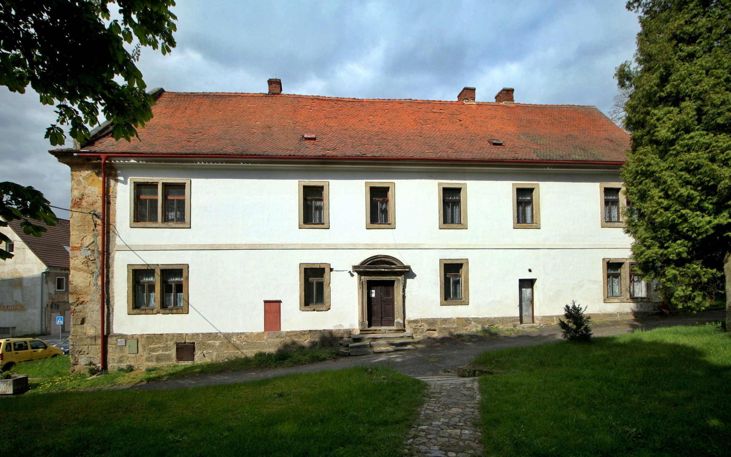 Stráž pod Ralskem kostel